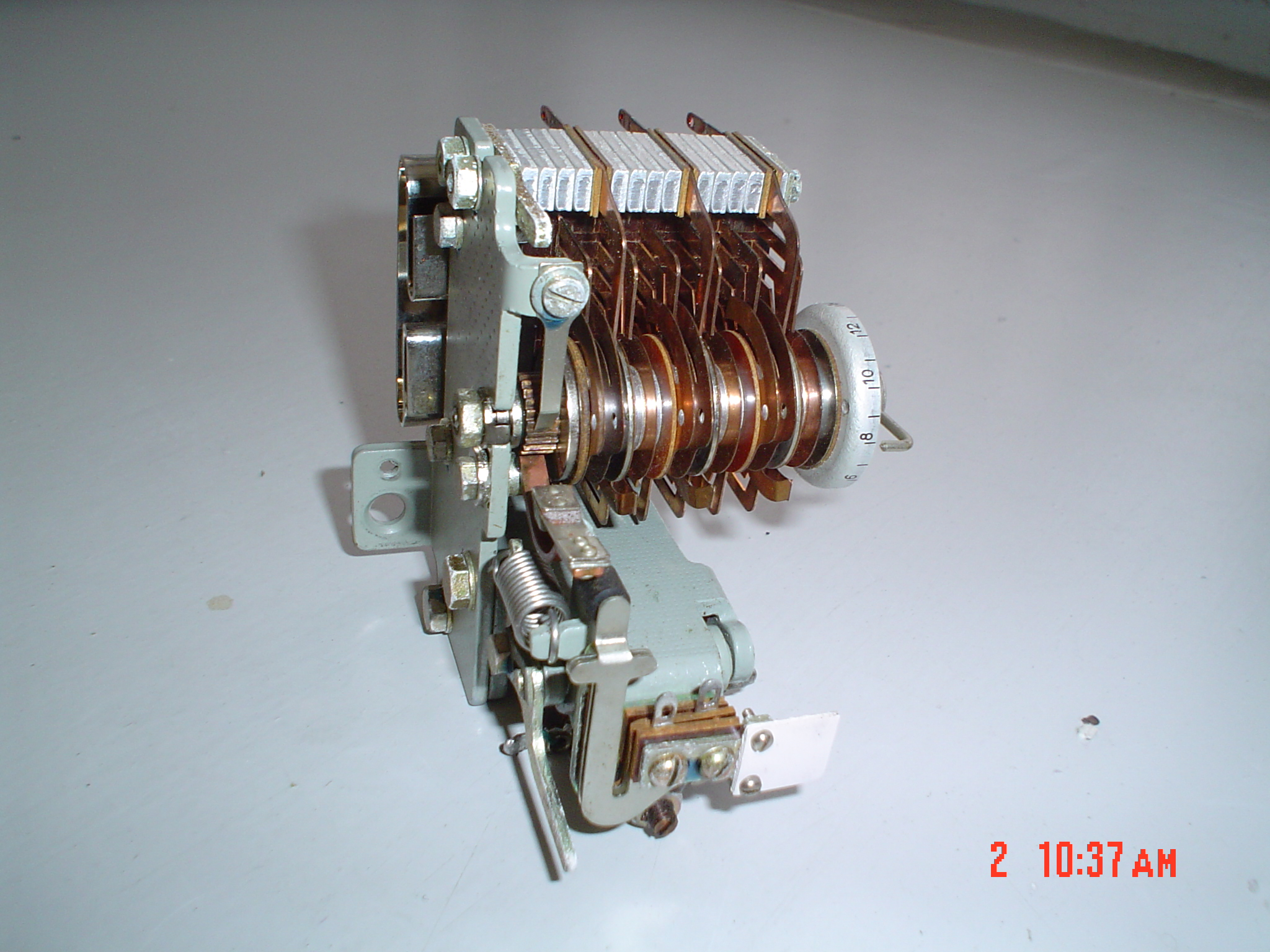 Paŝa_maŝino funkcias de diskoimpulsoj.